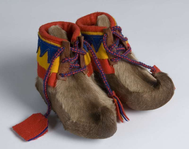 Skaller, laget av Kirsten Nordvang, Karasjok Husflid ca. 1977